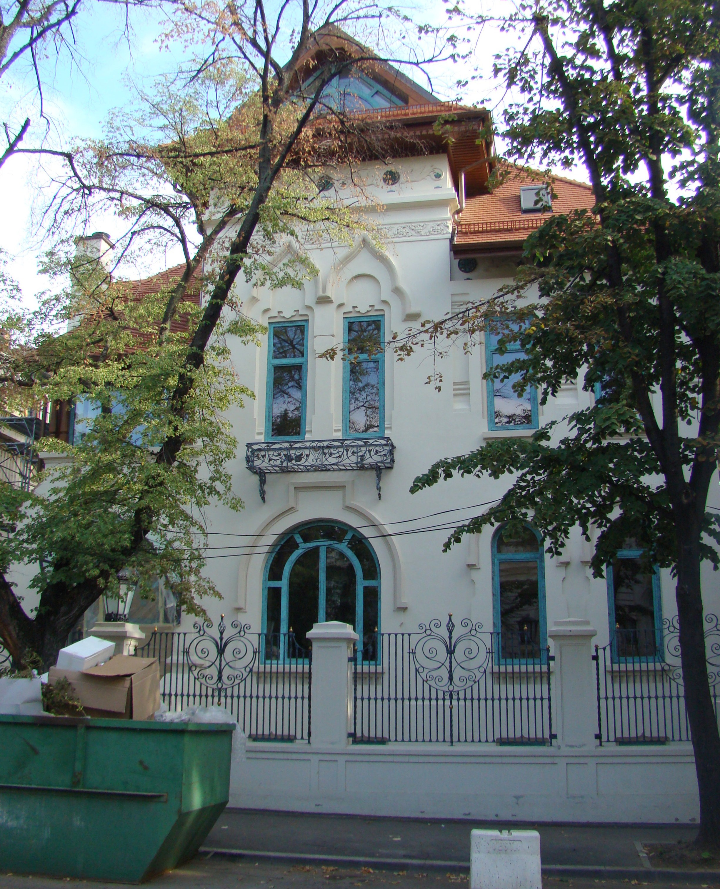 Casă monument istoric, str. Aleea Alexandru, nr.4